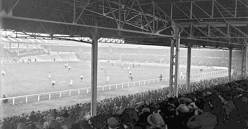 Match de football au stade Buffalo de Montrouge, près de Paris, le 11 février 1923.